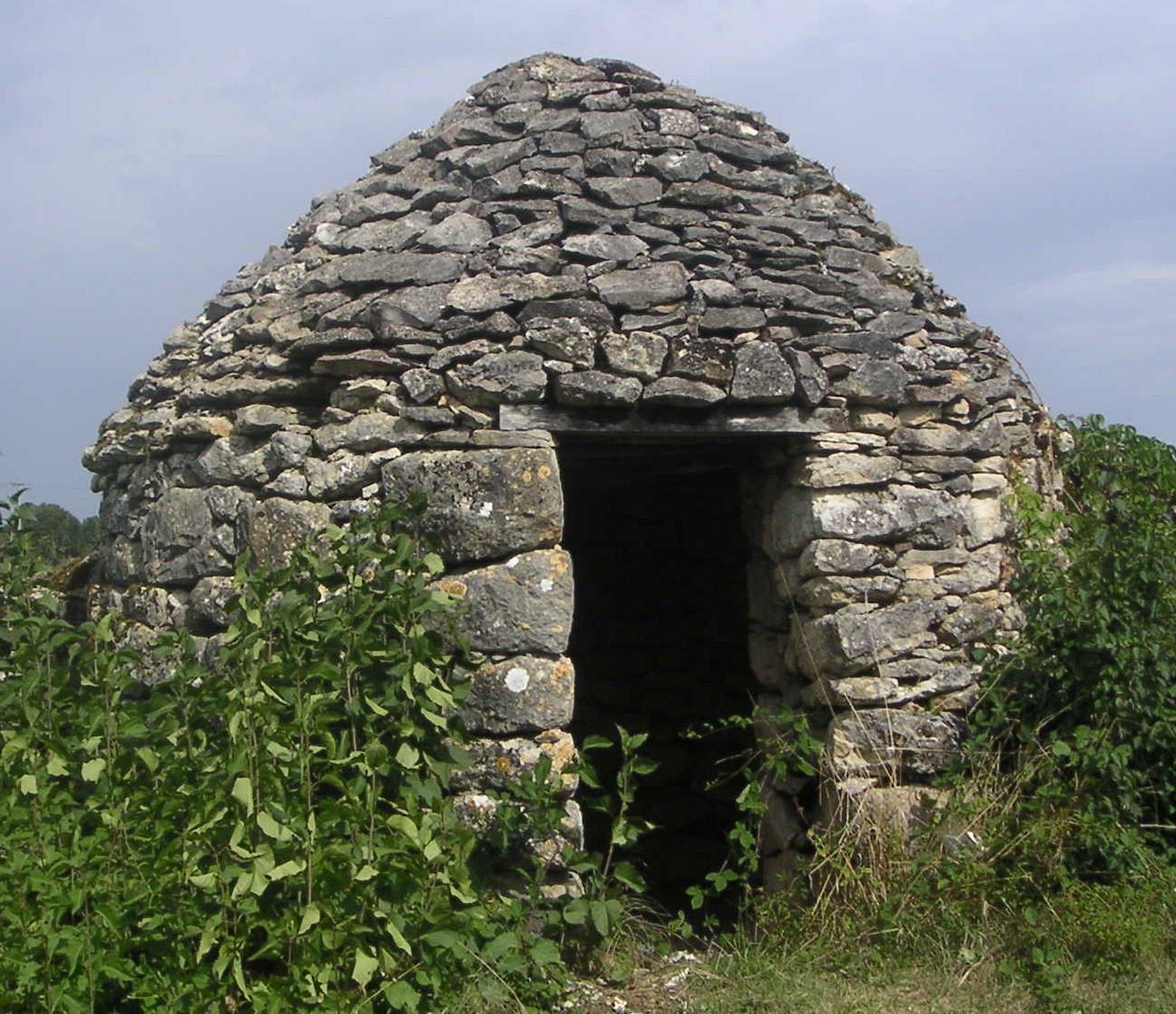 Gariotte du Lot, département du sud-ouest de la France. Construction en pierres sèches qui servait au cultivateur, au vigneron, à se protéger des intempéries.